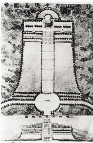 中山陵图案